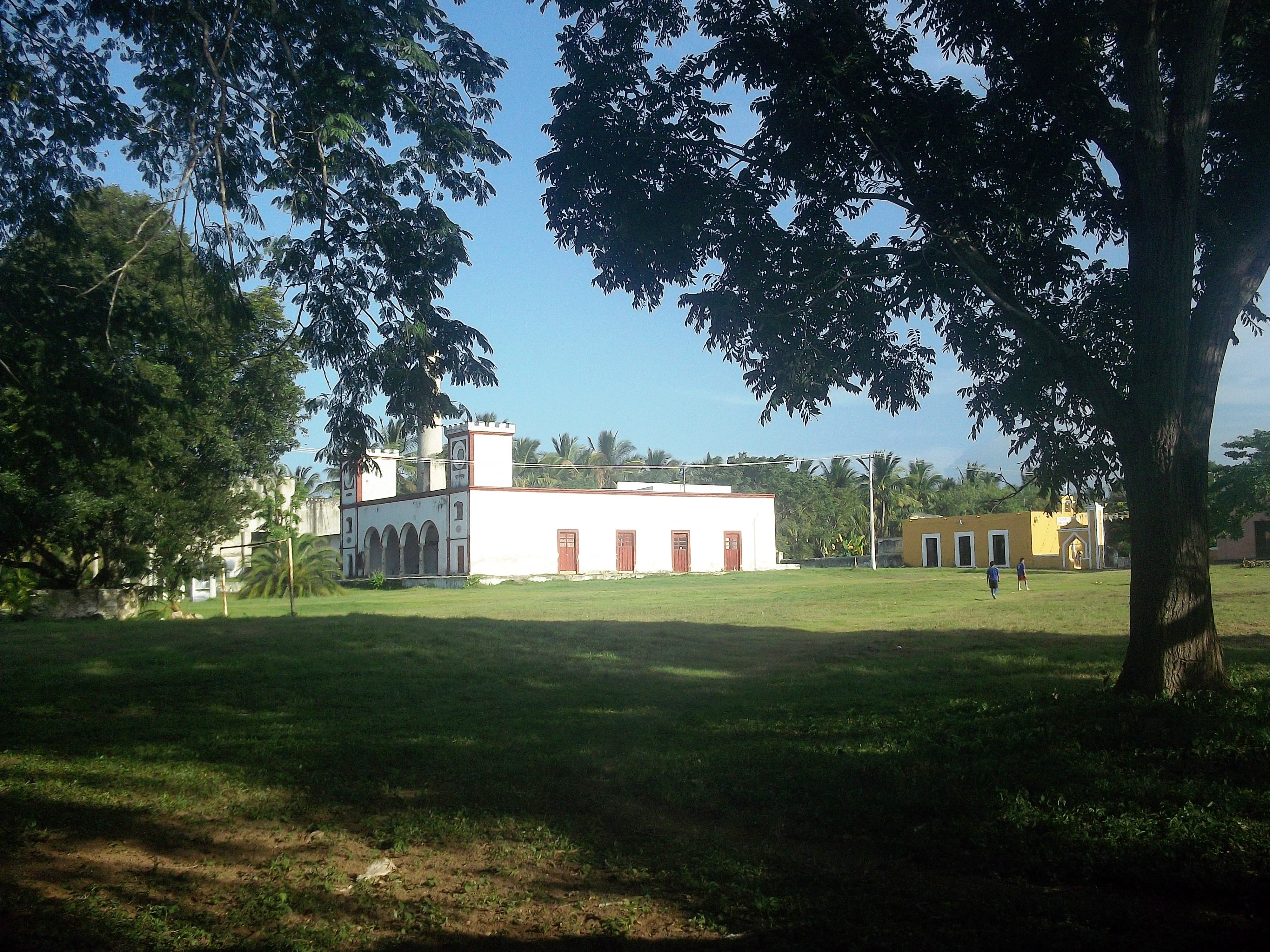 Hacienda de Oxtapacab, Yucatán.